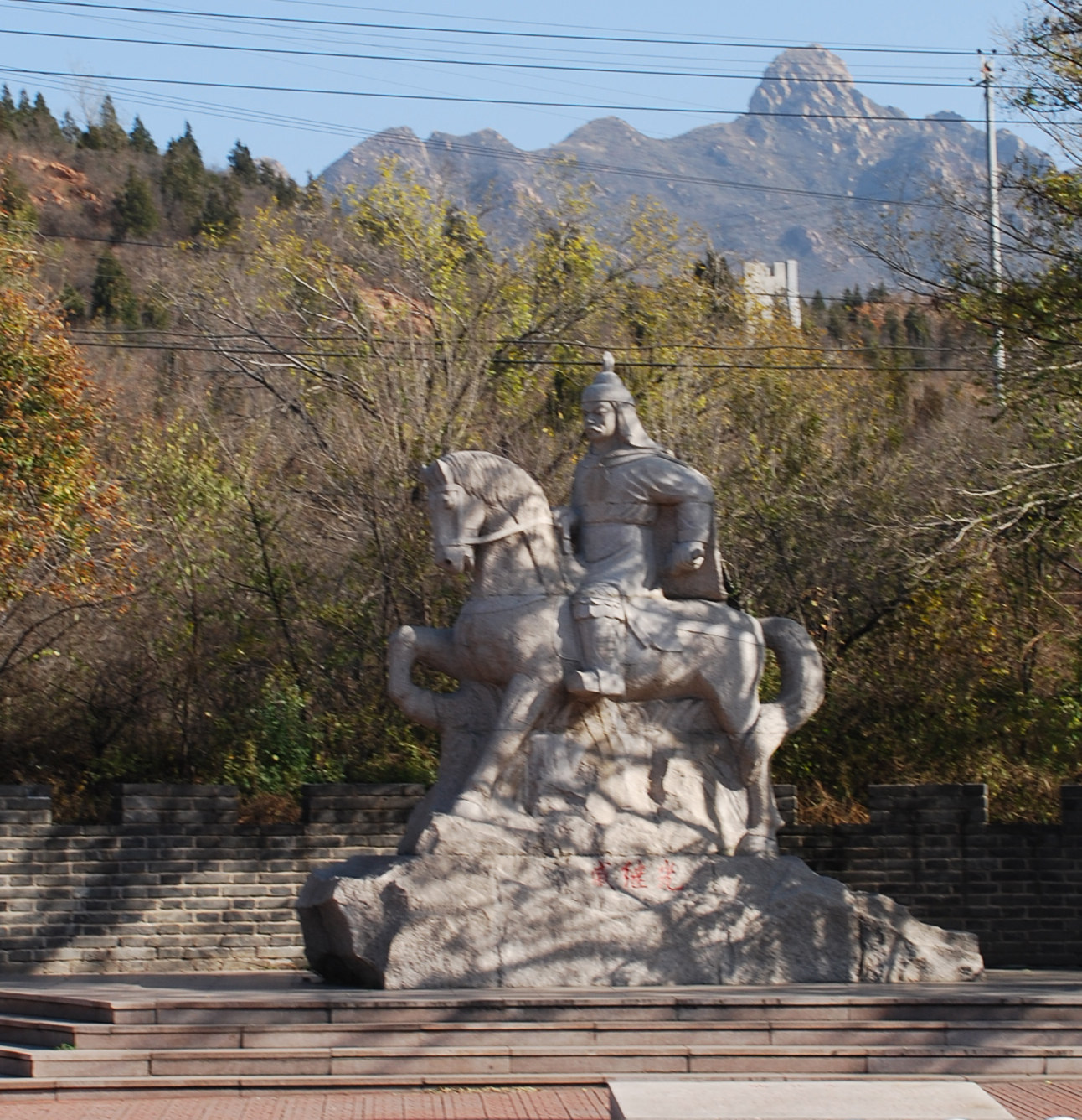 Qi Jiguang at Badaling, Beijing